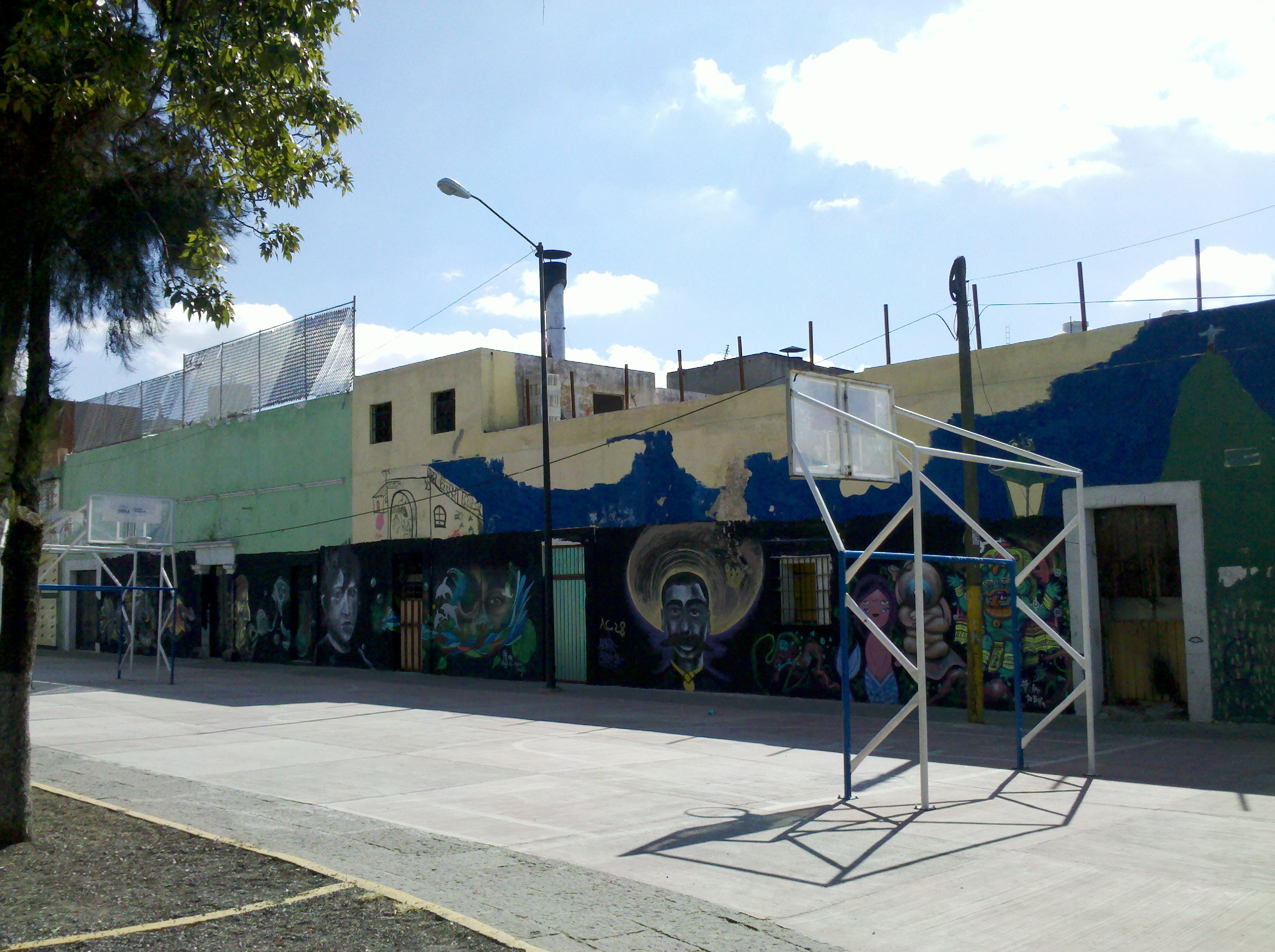 Barrio de San Antonio en Puebla, México. Vista desde 24 poniente entre 3 norte y 5 de mayo.